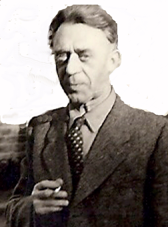 Portrait Paul Henkes